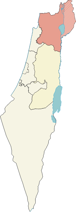 La région administartive du nord d'Israël, incluant le Golan occupé